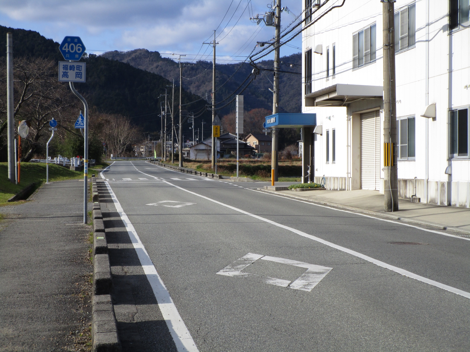 兵庫県道406号田口福田線（福崎町高岡より撮影）